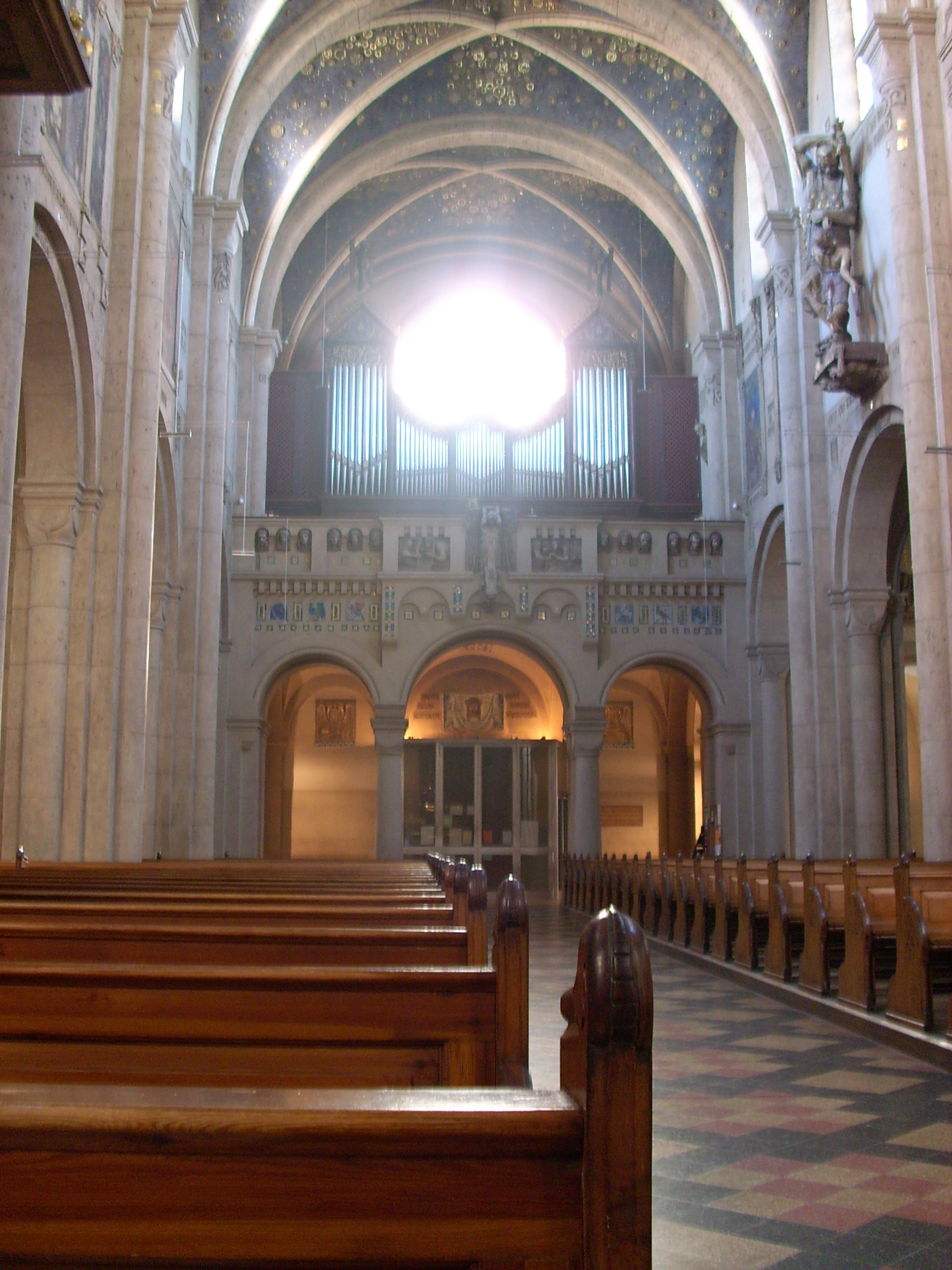 Blick zur Empore der Kirche